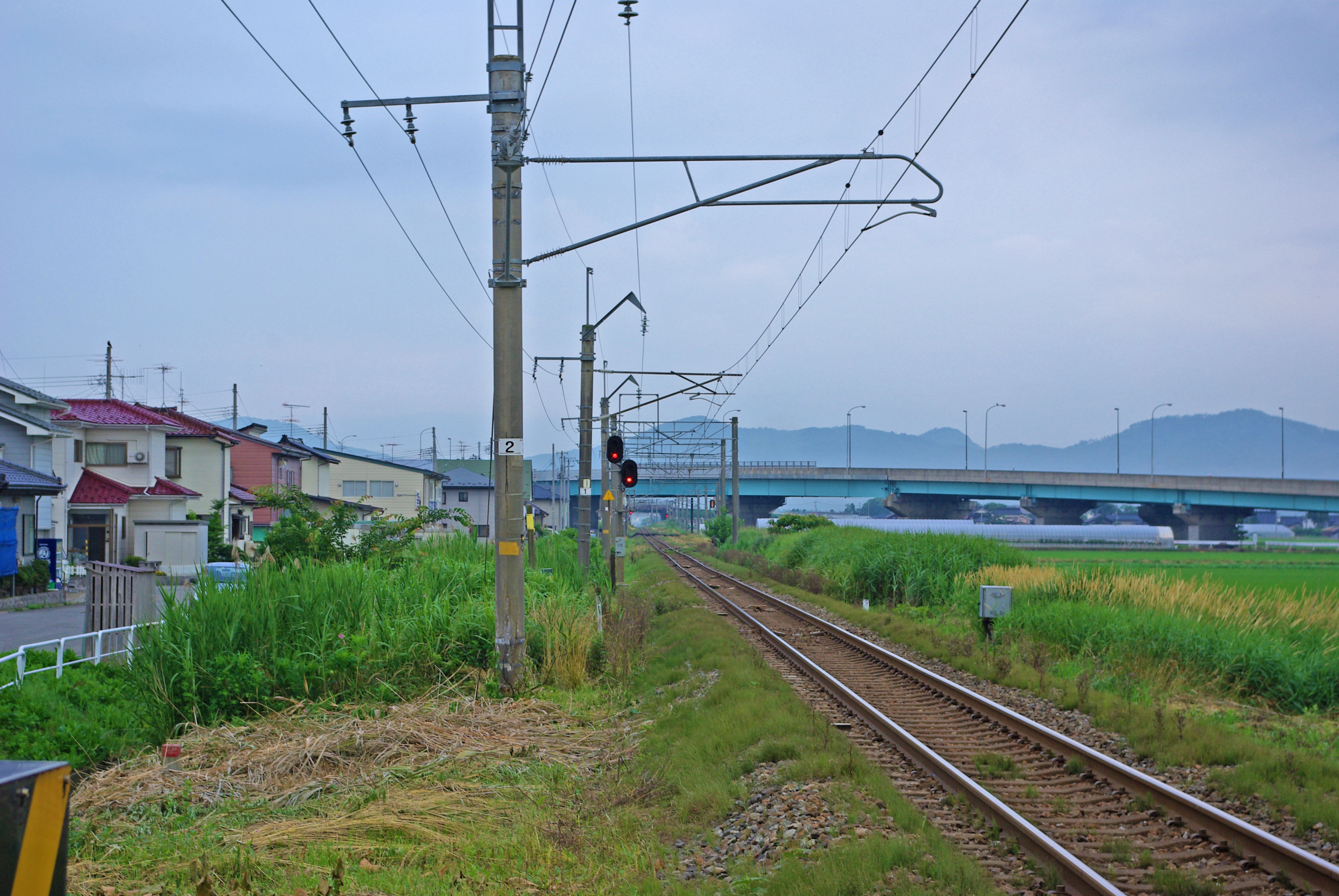 東日本旅客鉄道羽越本線西鶴岡信号場